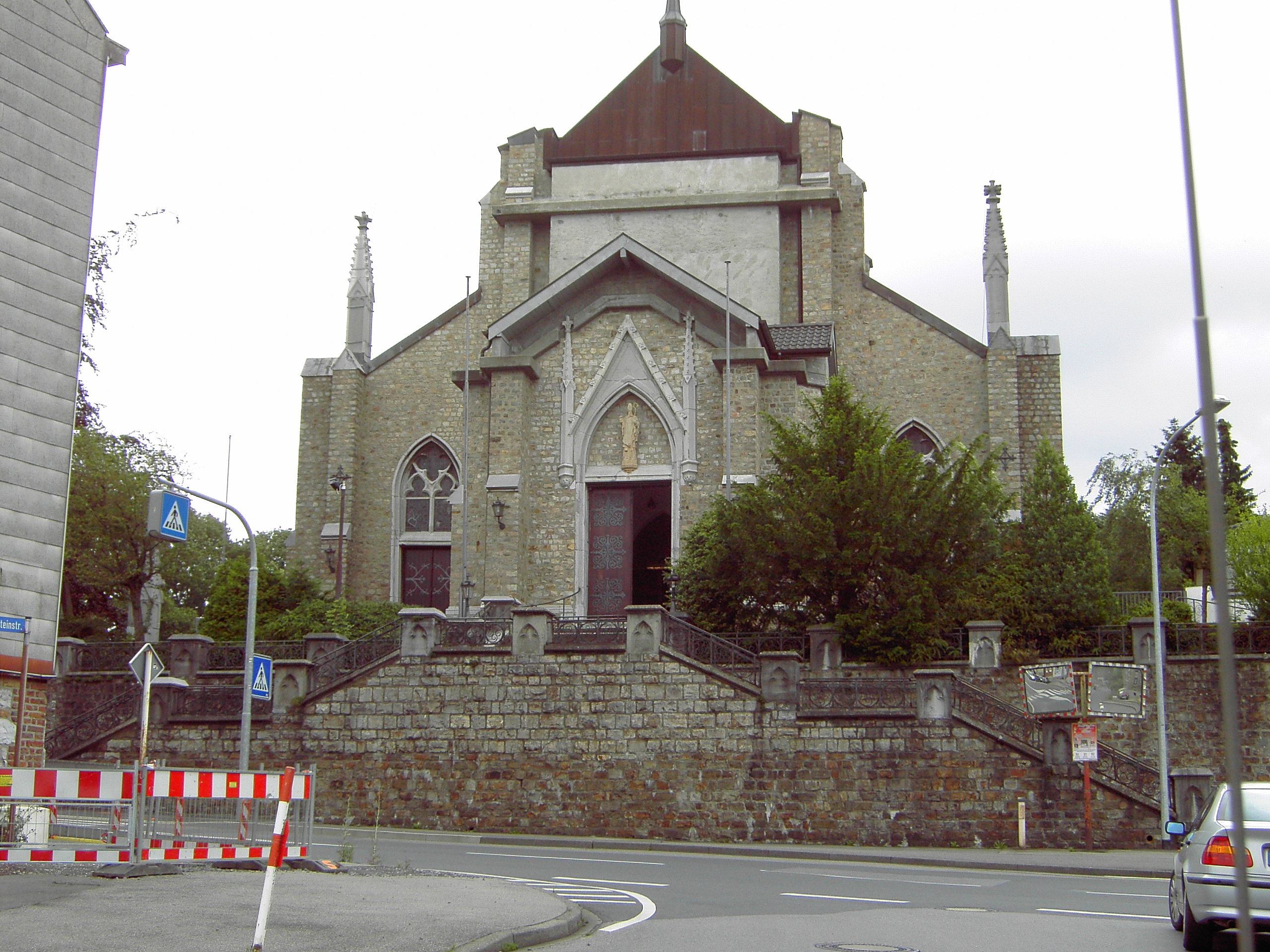 Kirche in Büsbach